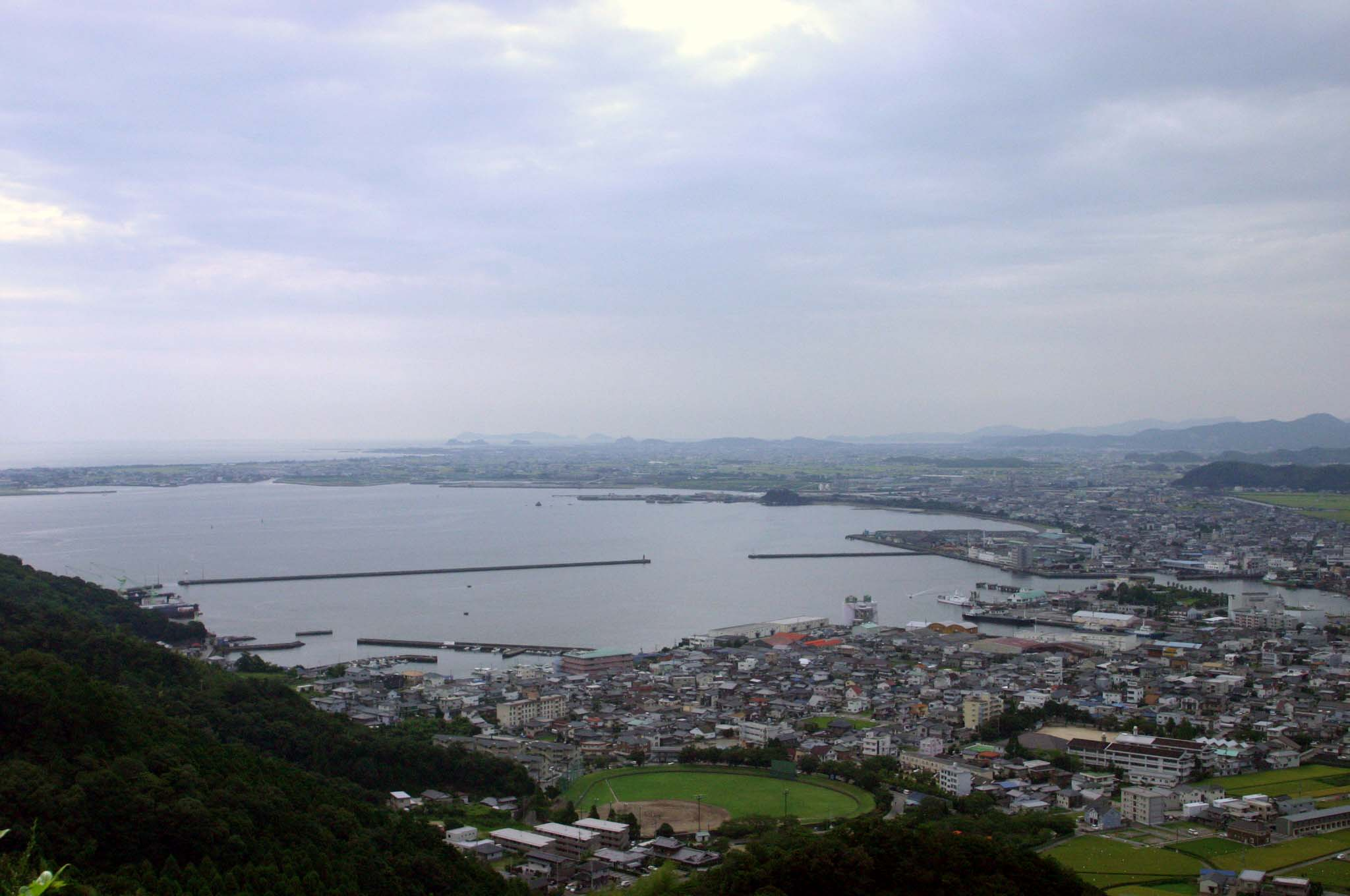 小松島湾全景